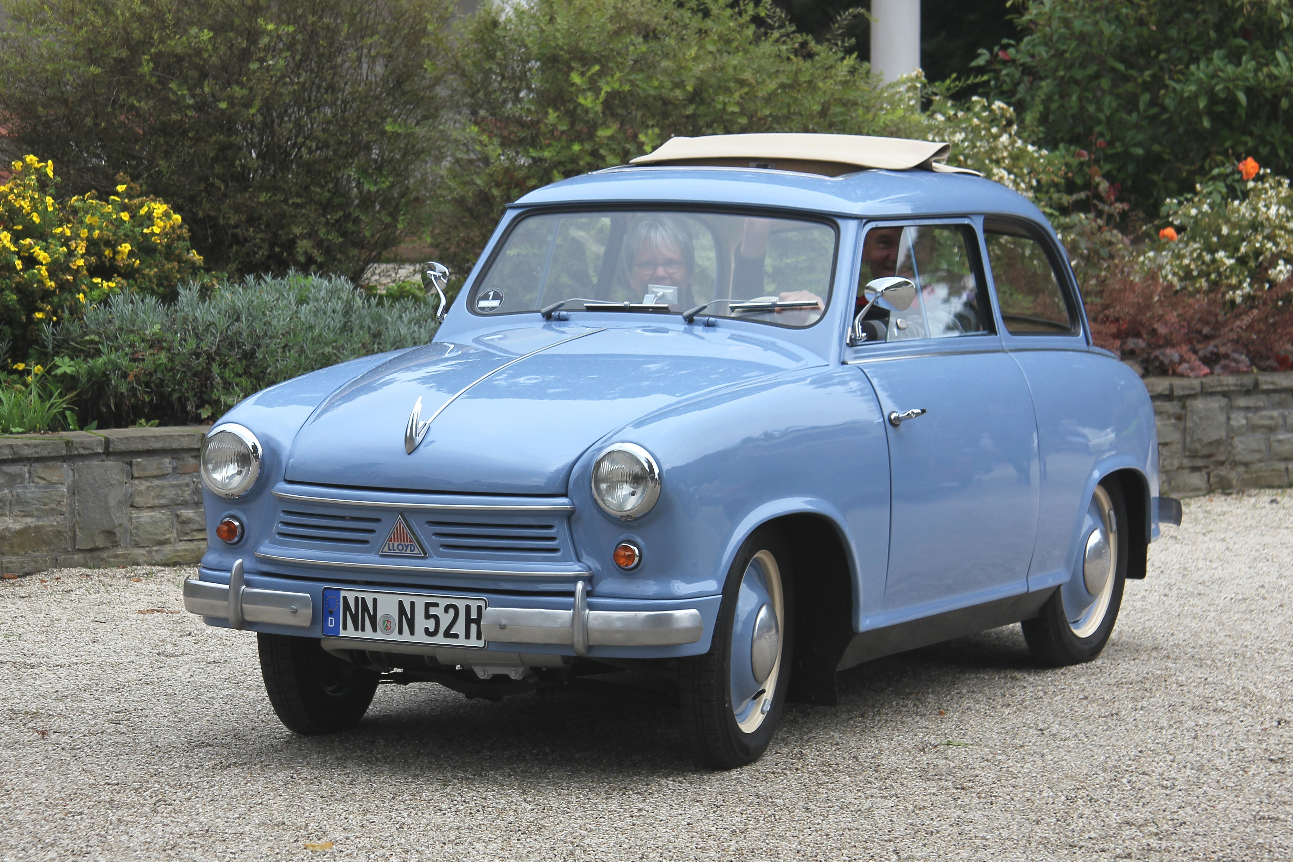 Lloyd LP 400, Baujahr 1955: Zweizylinder-Zweitaktmotor, 386 cm³, 13 PS (Kennzeichen des Fahrzeugs verändert)